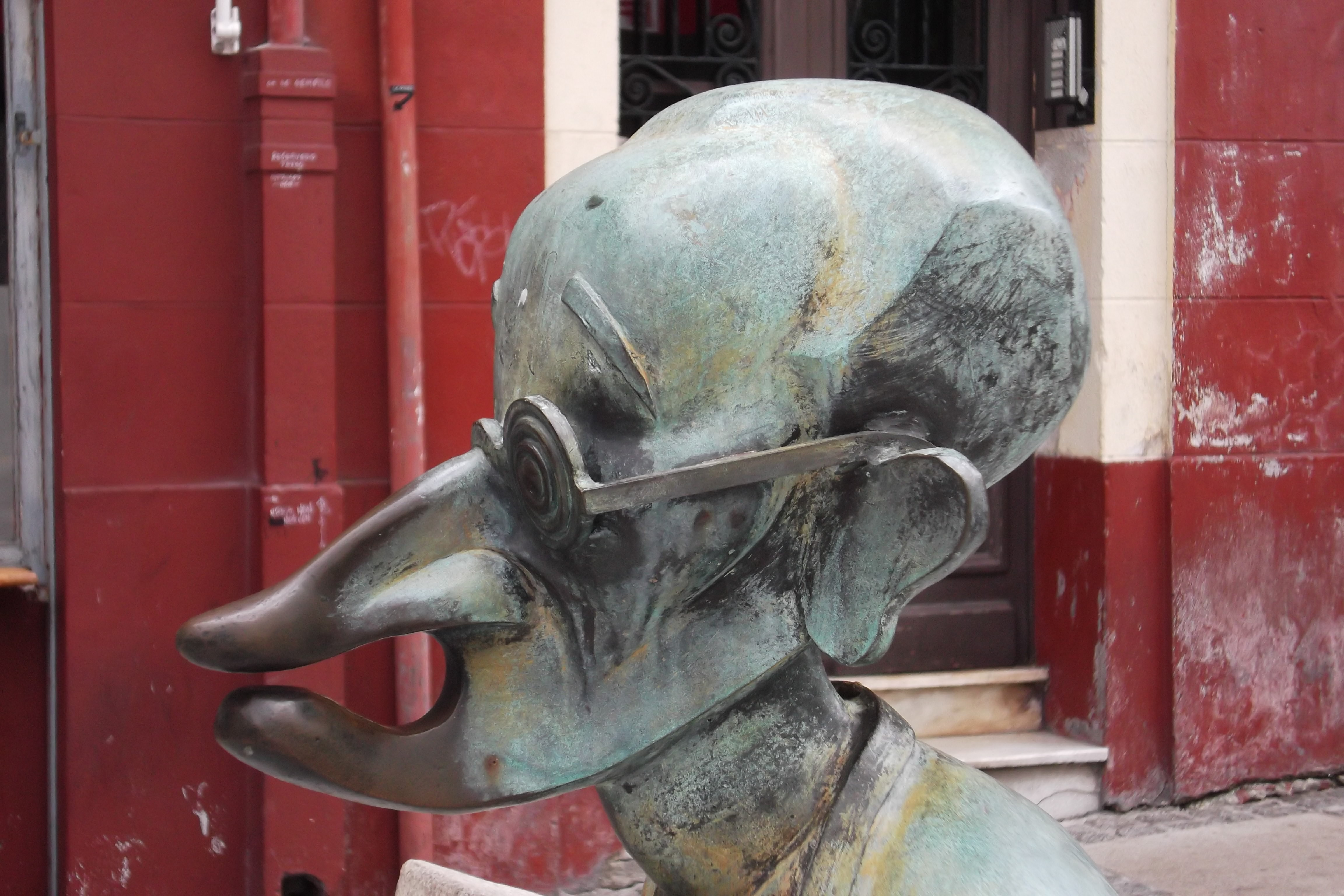 Busto de Vicente Risco na praza do Humor (antes praza dos Ovos), na Coruña.